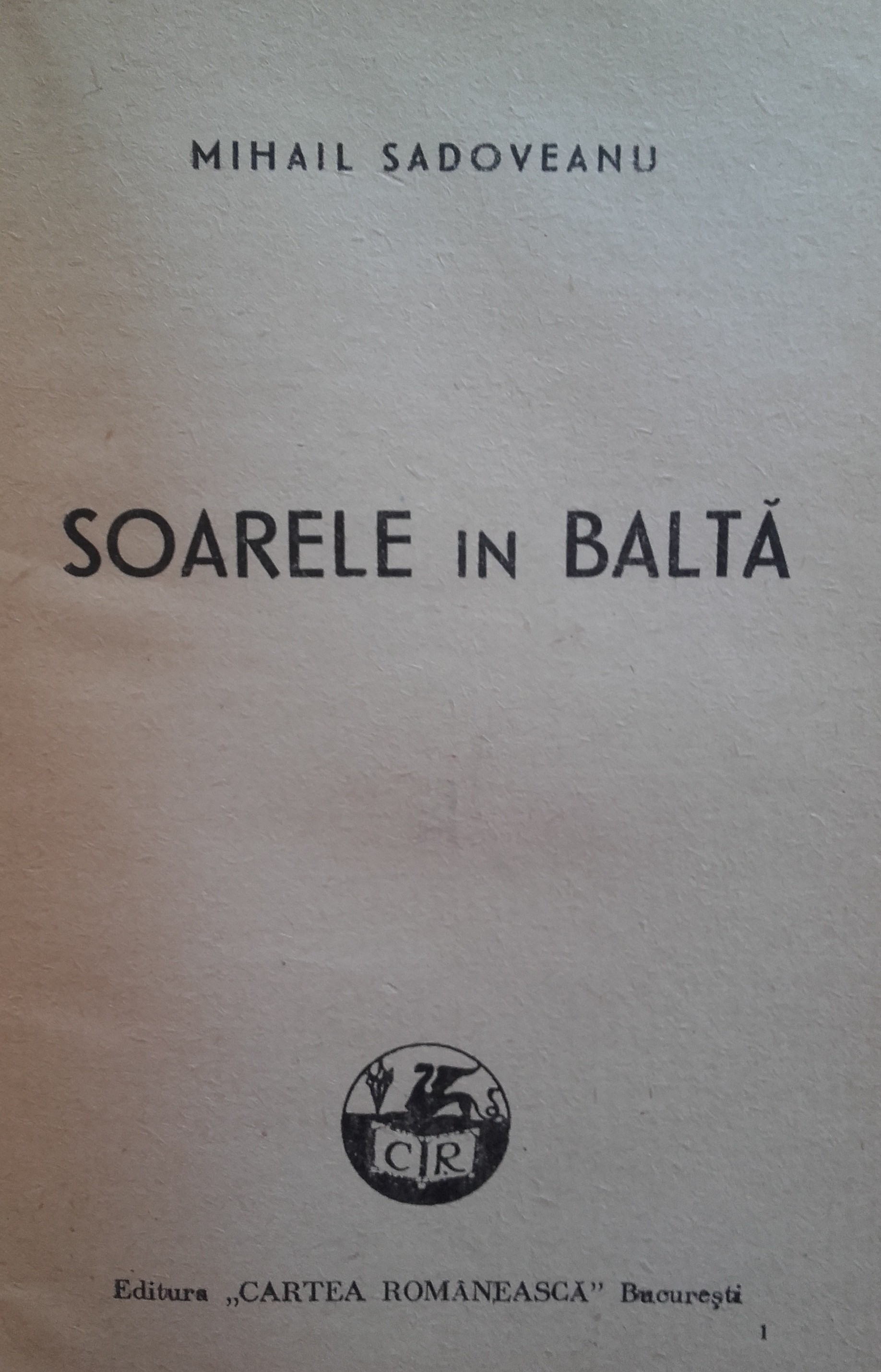 Scanare digitală a ediției princeps (prima pagină) - „Soarele în baltă”